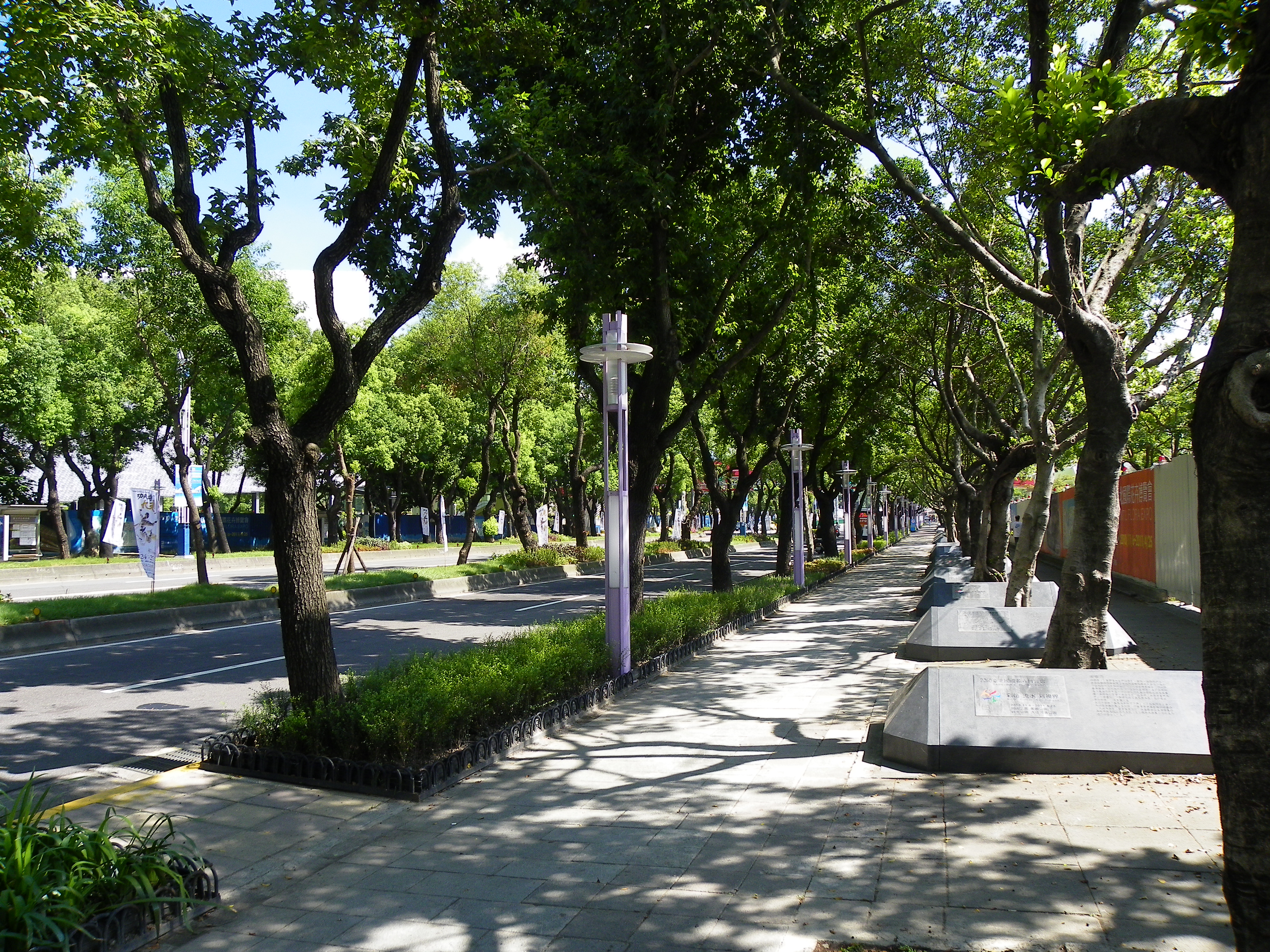 臺北市中山區中山北路三段美術公園附近的人行道。